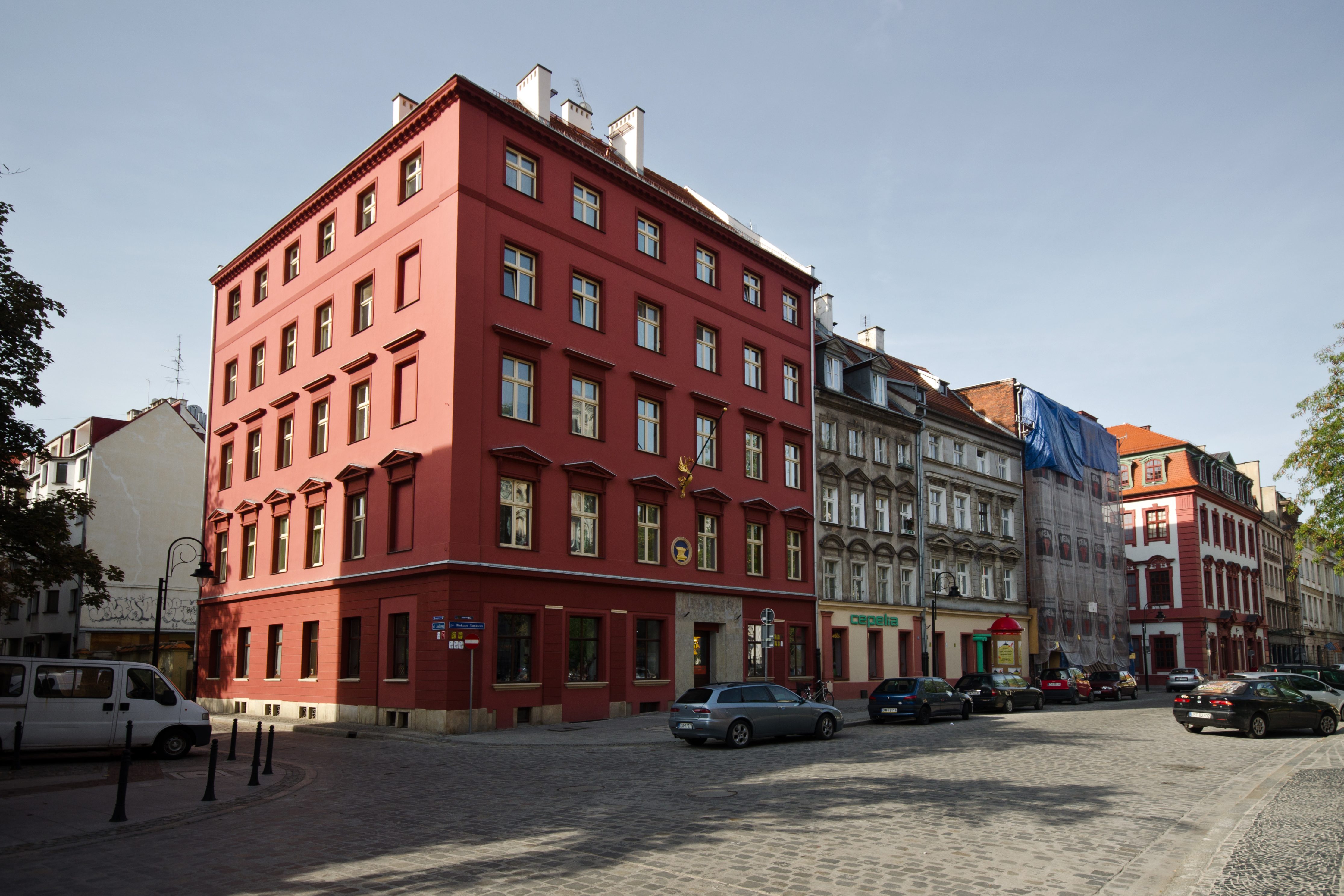 Wrocław Stare Miasto, pl. Nankiera 7 - kamienica (zabytek nr A/1607/8)